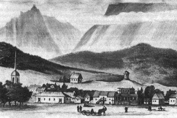 крепость Владикавказ конца 18 века с картины художника А. Дьяконова